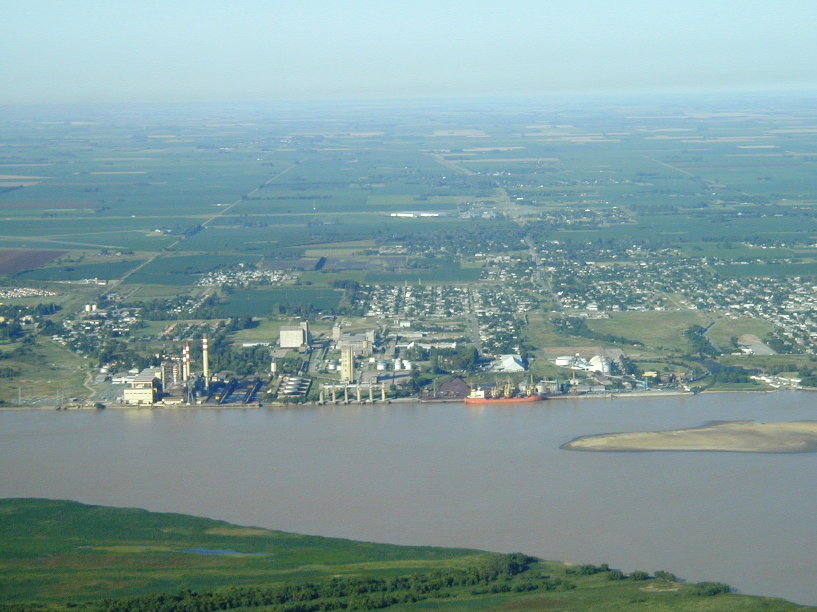 Vista aérea del puerto de San Nicolás